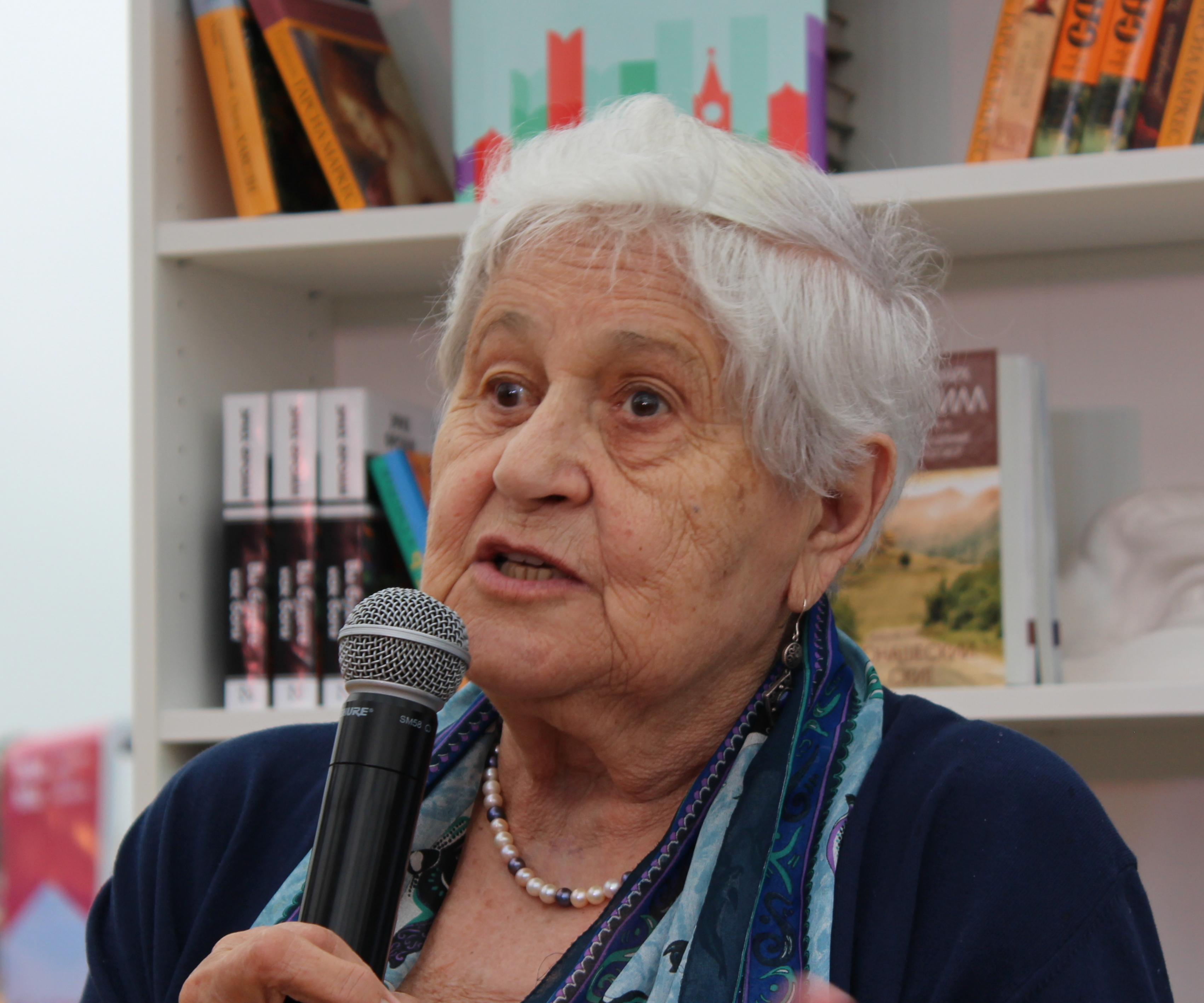 Ю.Б. Гиппенрейтер на Красной площади.Фестиваль "Книги России".